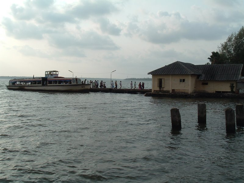 വൈക്കം ബോട്ട് ജെട്ടി